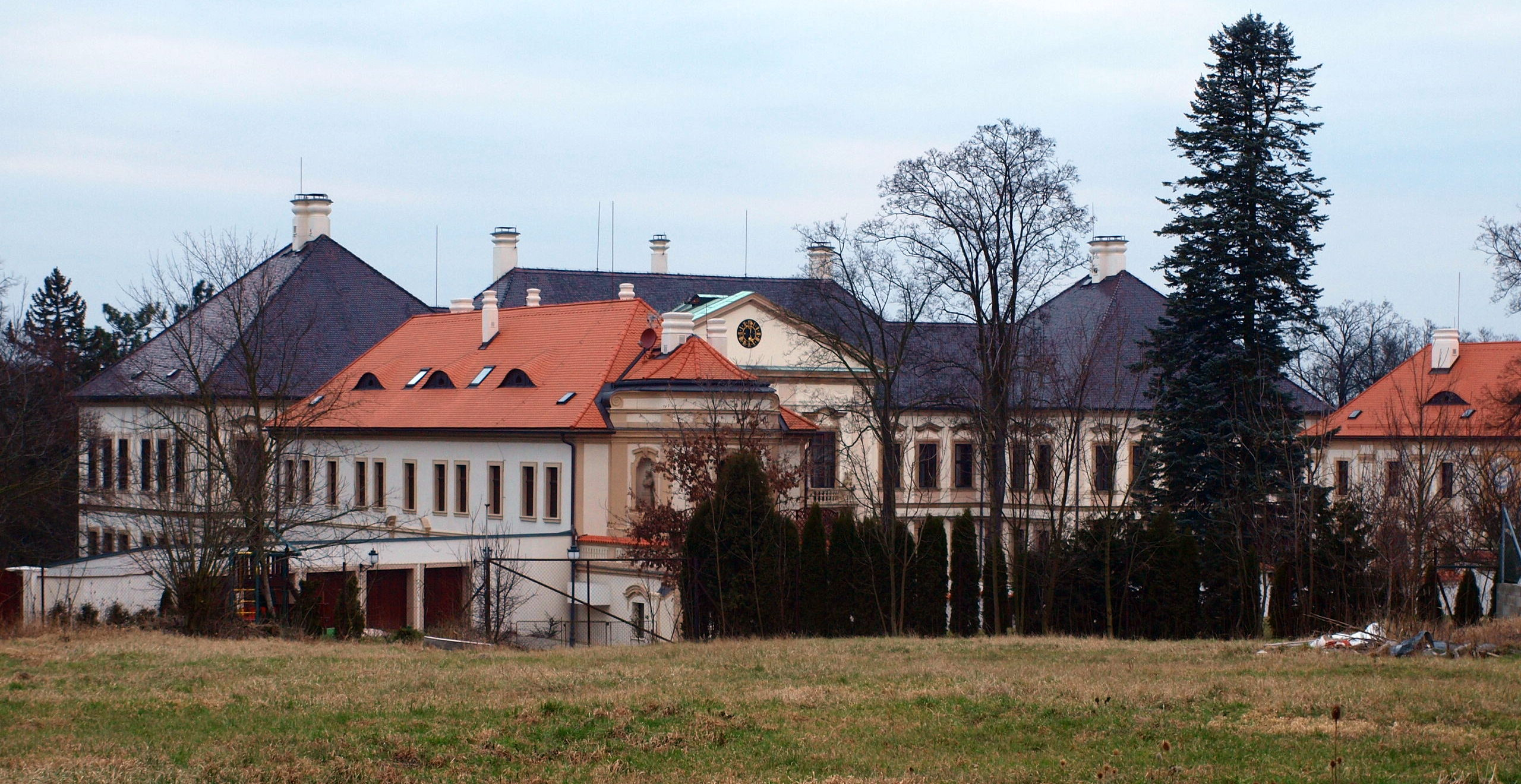 Zámek Koloděje